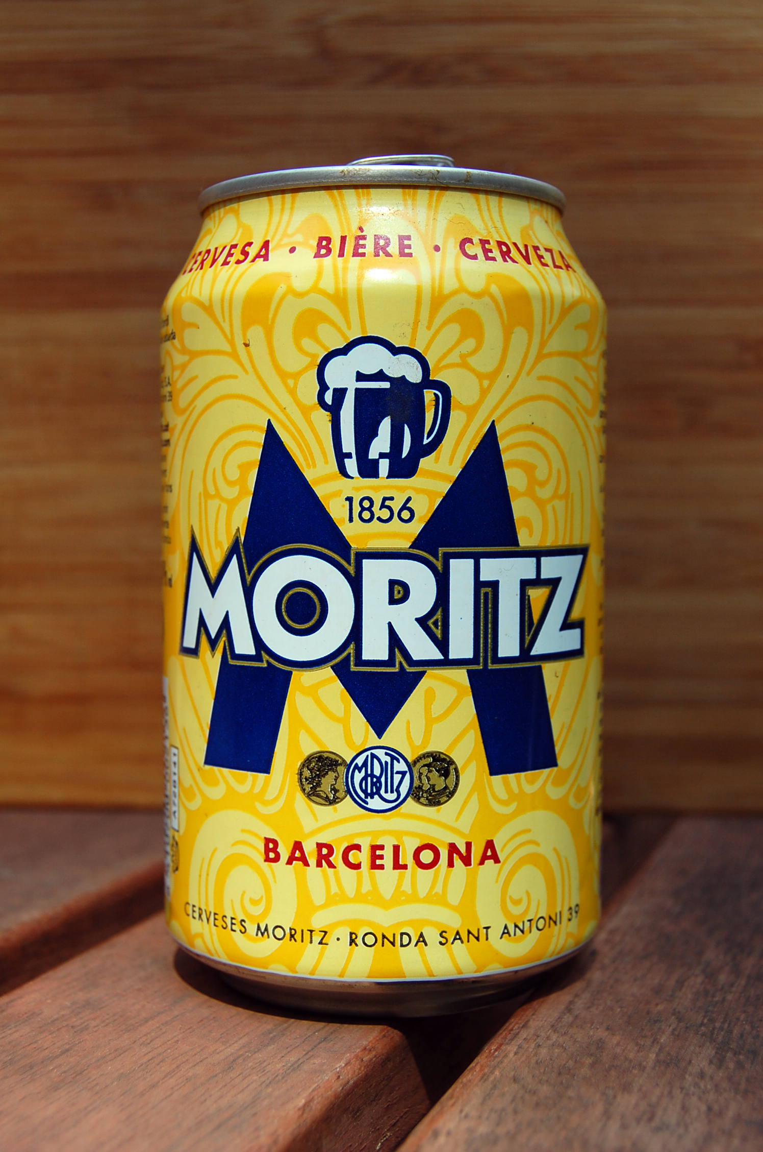 Llauna de cervesa Mortiz